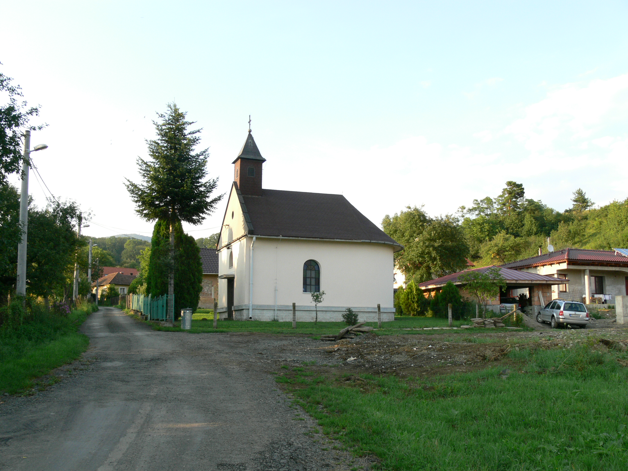 Na začiatku osady návštevníkov víta malebný kostol